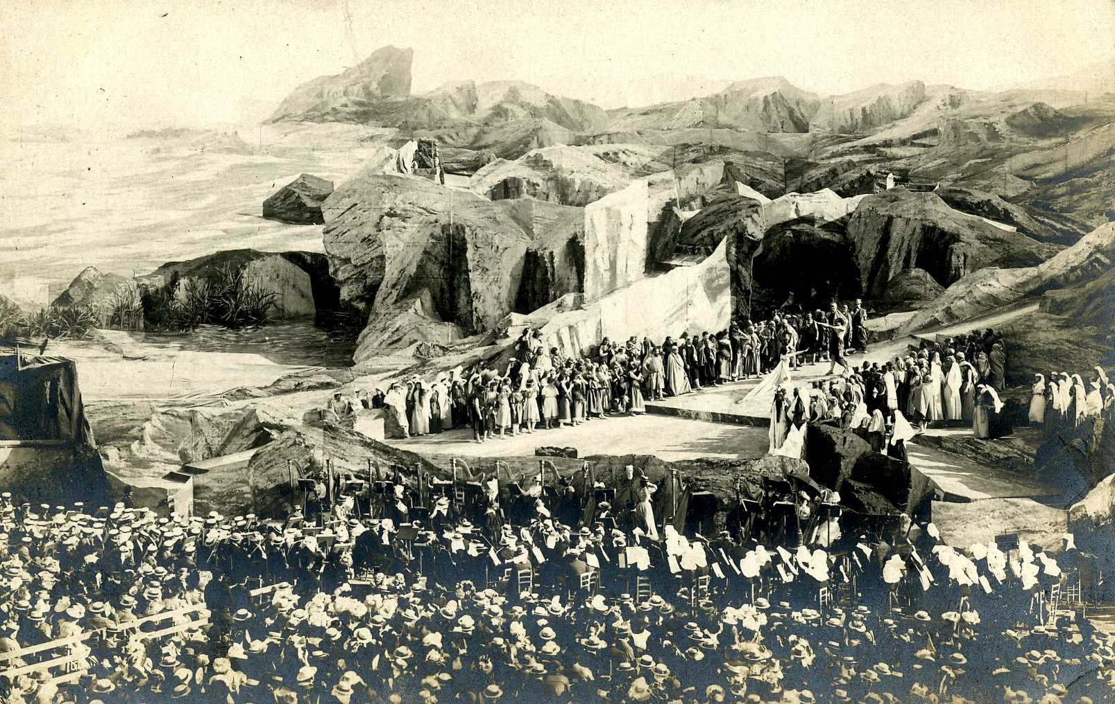 Carte postale éditée en 1900 lors de la représentation de l'opéra Prométhée de Gabriel Fauré au Théâtre des Arènes, à Béziers.